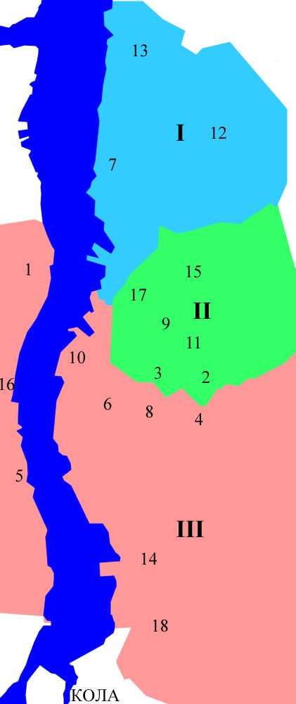 Murmansk all districts